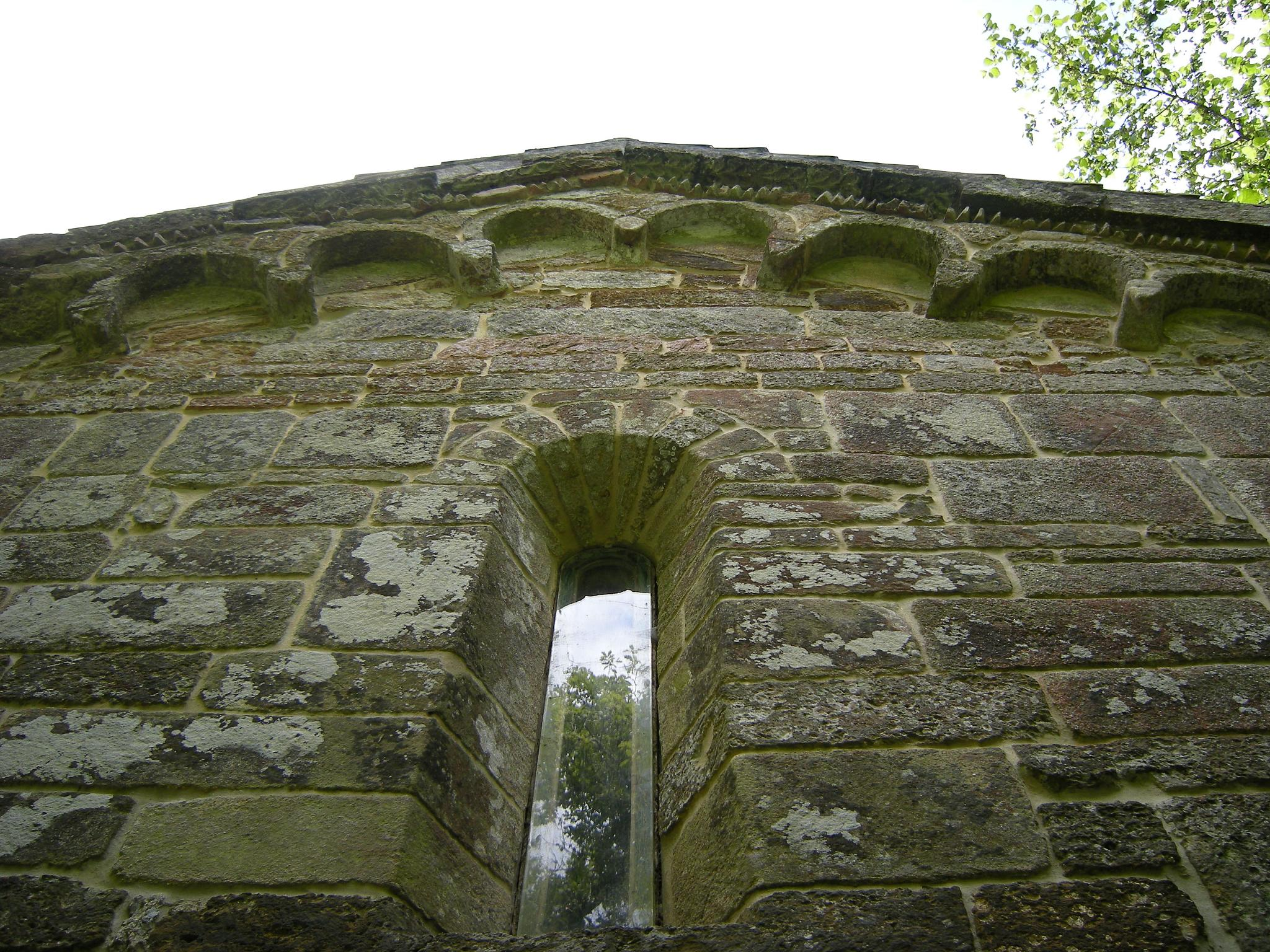 gl: Igrexa prerrománica de Santo Antolín de Toques